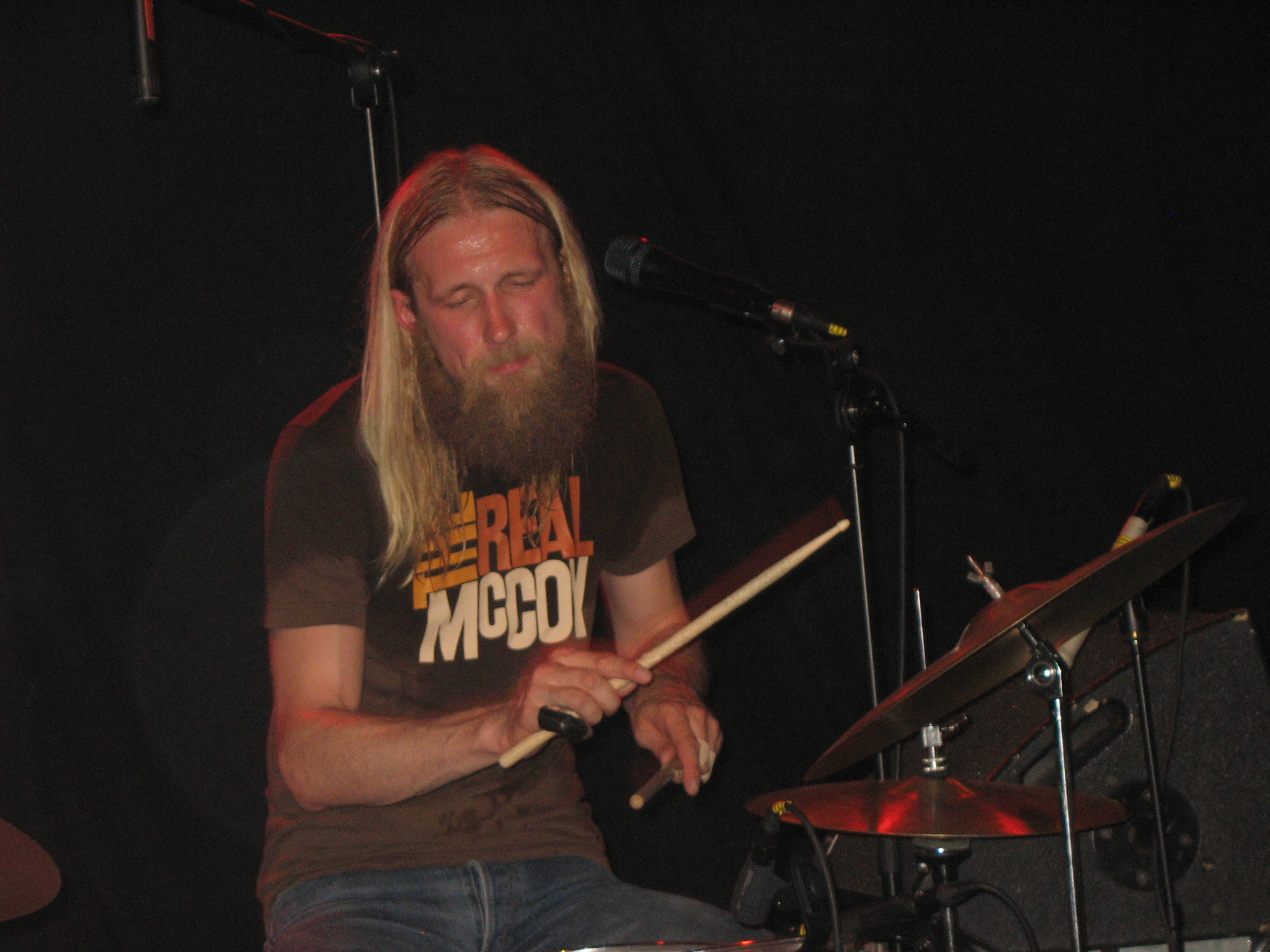 Olaf Olsen, trommeslagar i Bigbang, under konsert på EnergiMølla, Kongsberg